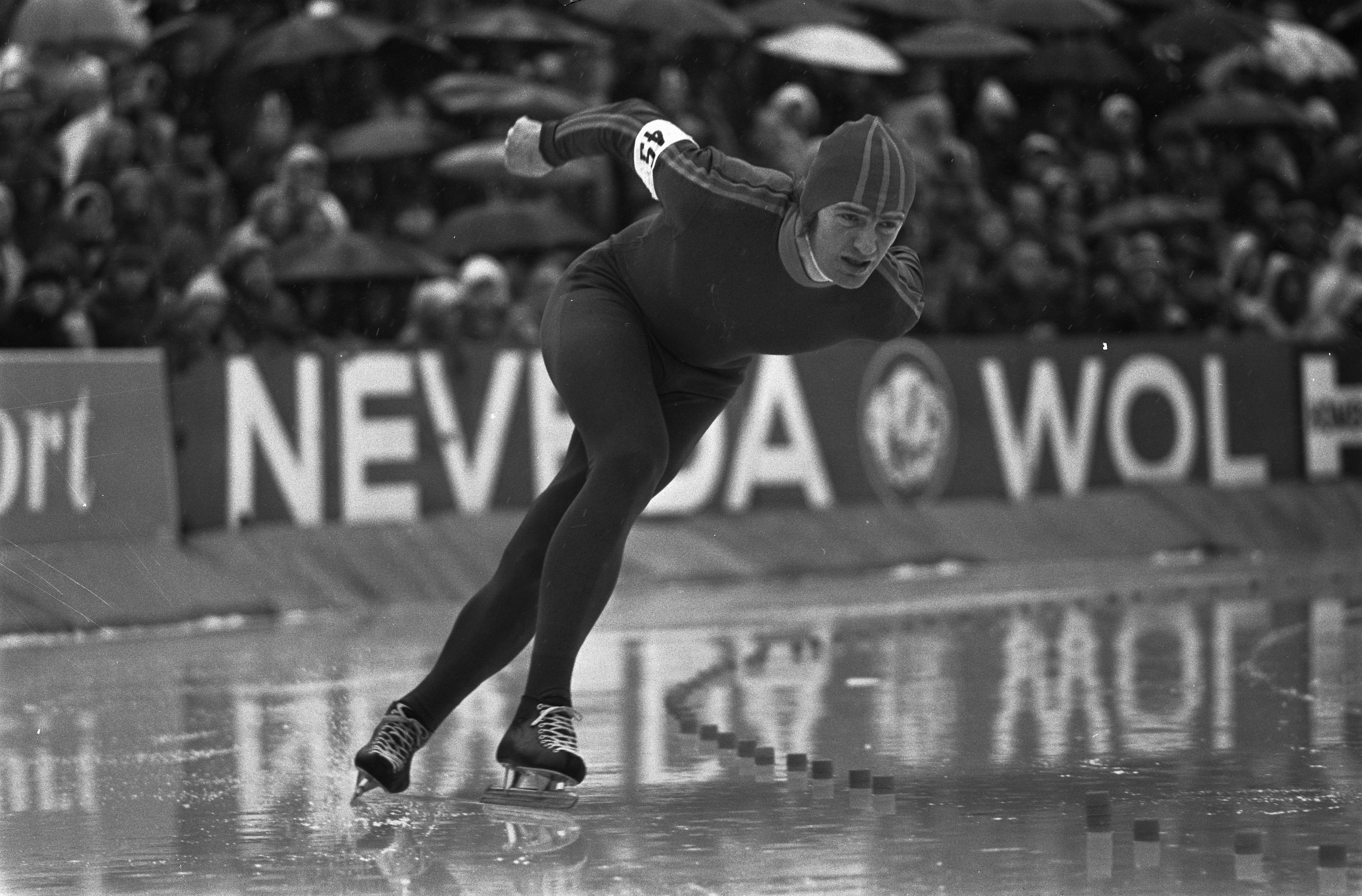 Wereldkampioenschappen schaatsen voor amateurs in Deventer Piet Kleine in aktie